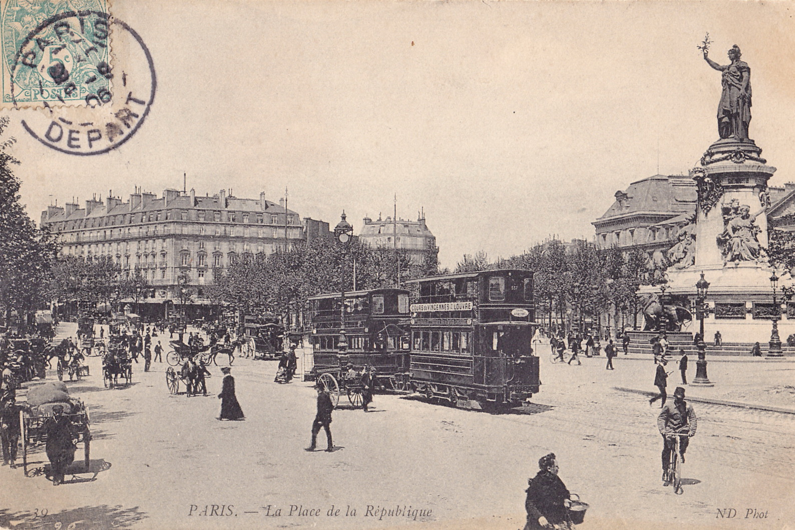 Carte postale ancienne éditée par ND n°39 :PARIS - La Place de la République